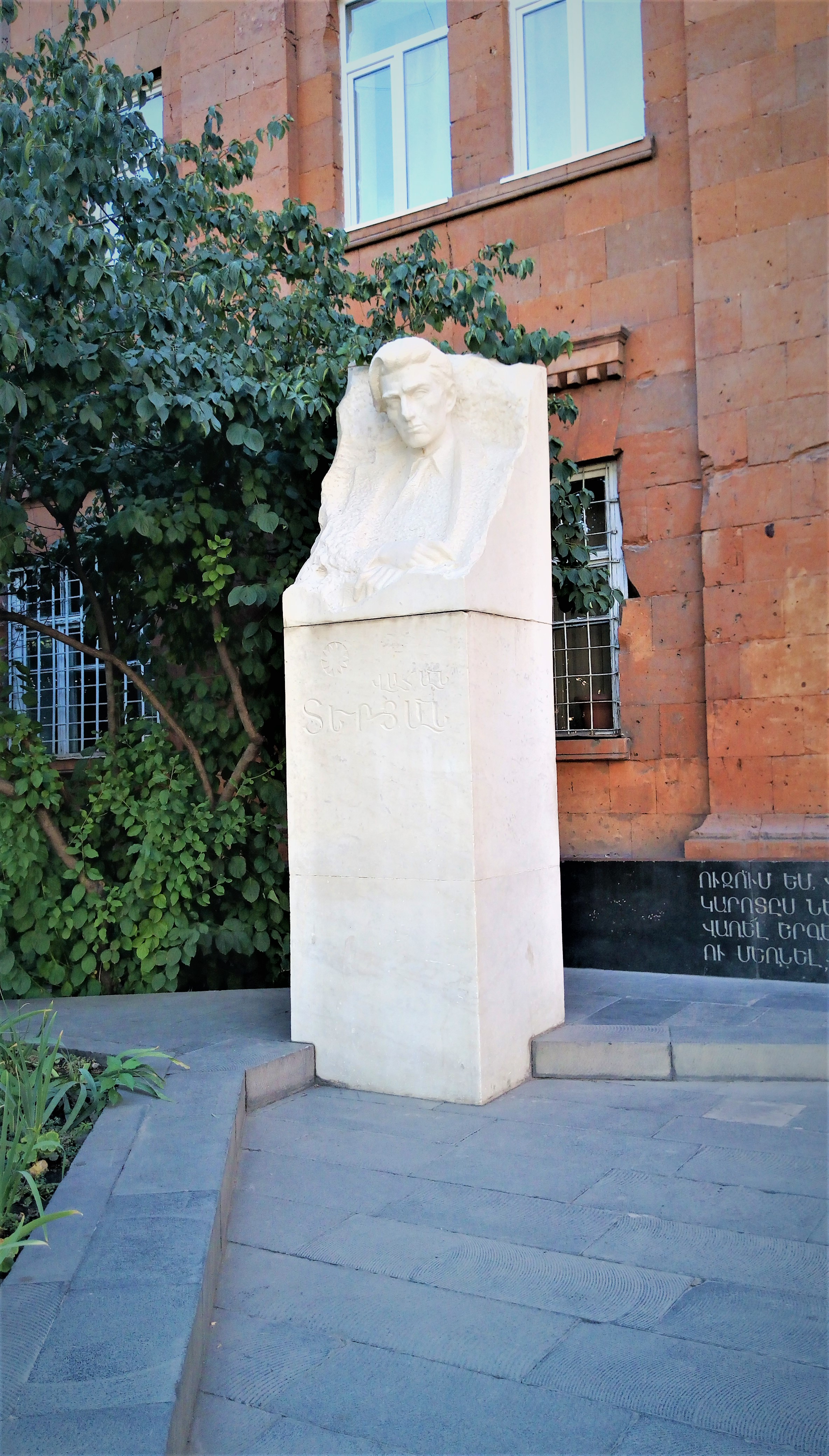 Bust, close to the basic school №60 named after Vahan Derian 5/17